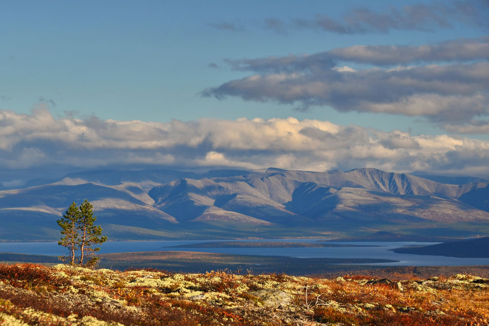 Мурманская область. Лапландский заповедник. Хибины. This image is related to the protected area of Russia number 5100013